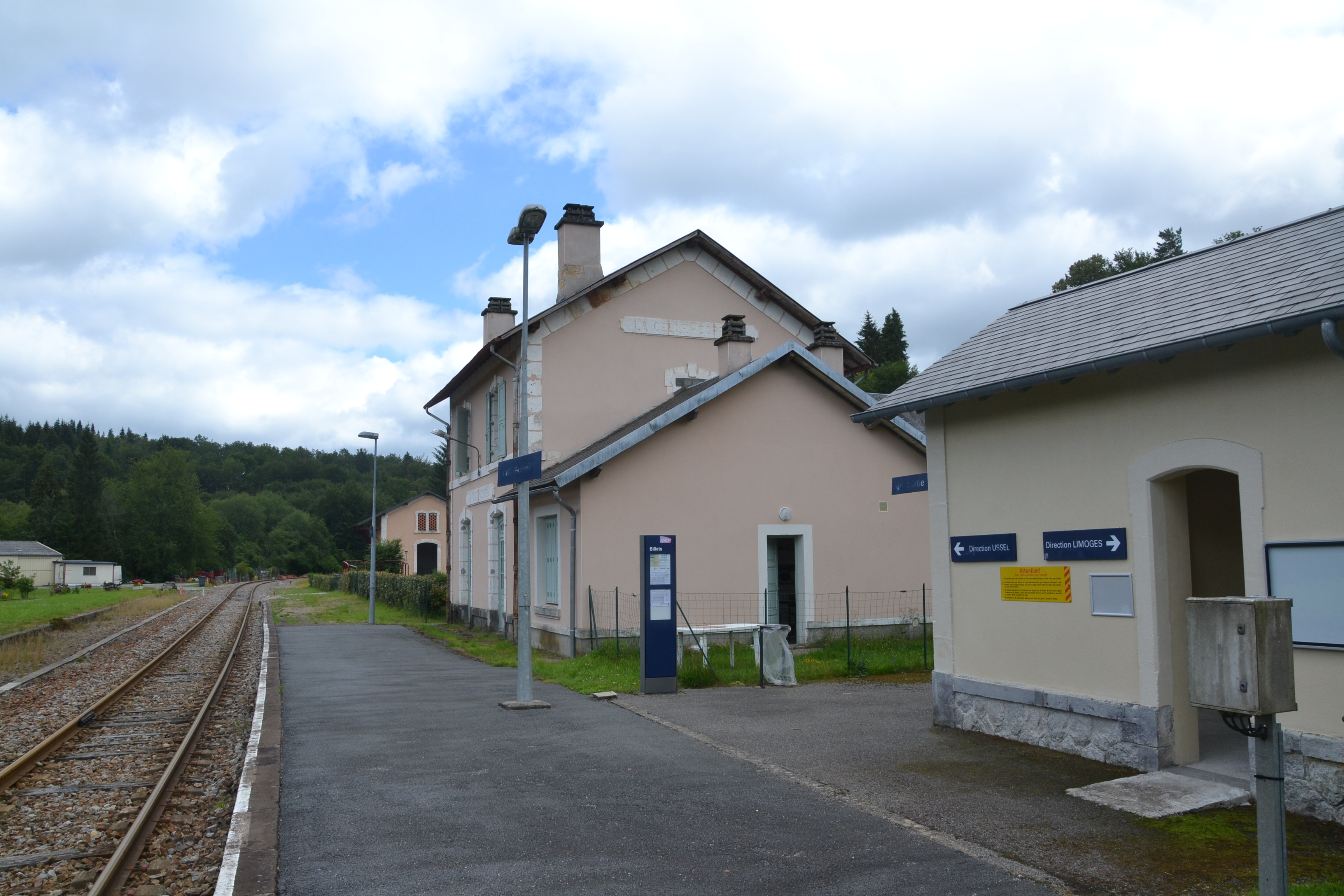 Gare de Lacelle (Corrèze, France), BV.